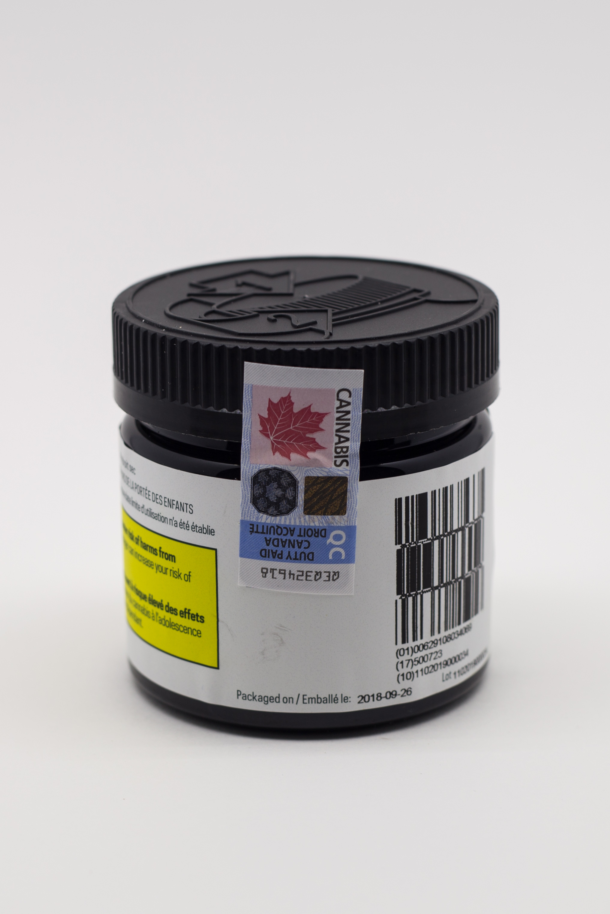 Exemple d'emballage de cannabis vendu par la Société québécoise du cannabis (SQDC)